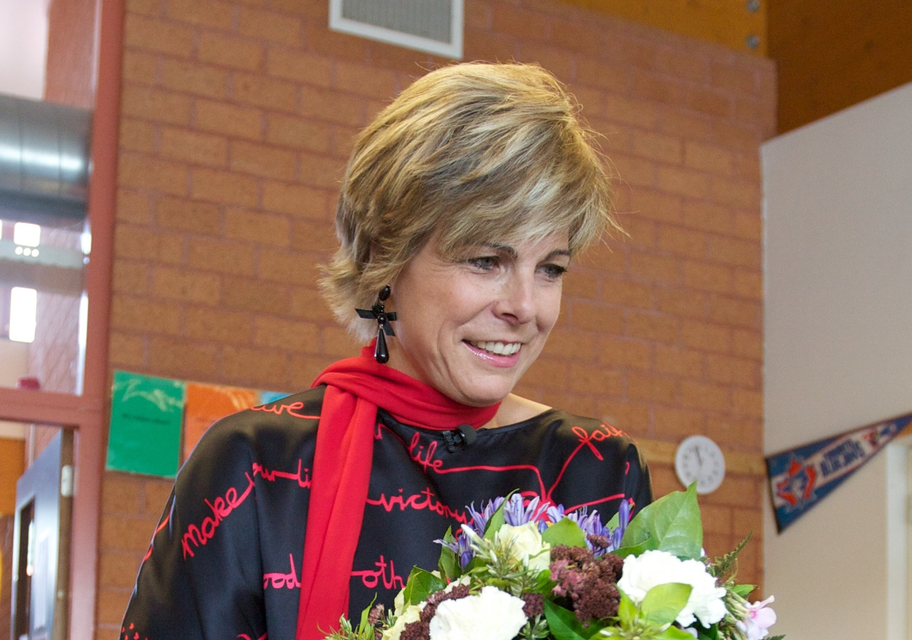 Prinses Laurentien brengt een verrassingsbezoek aan basisschool De Startbaan, één van de deelnemende scholen aan de recordpoging simultaan lezen. Zie ook